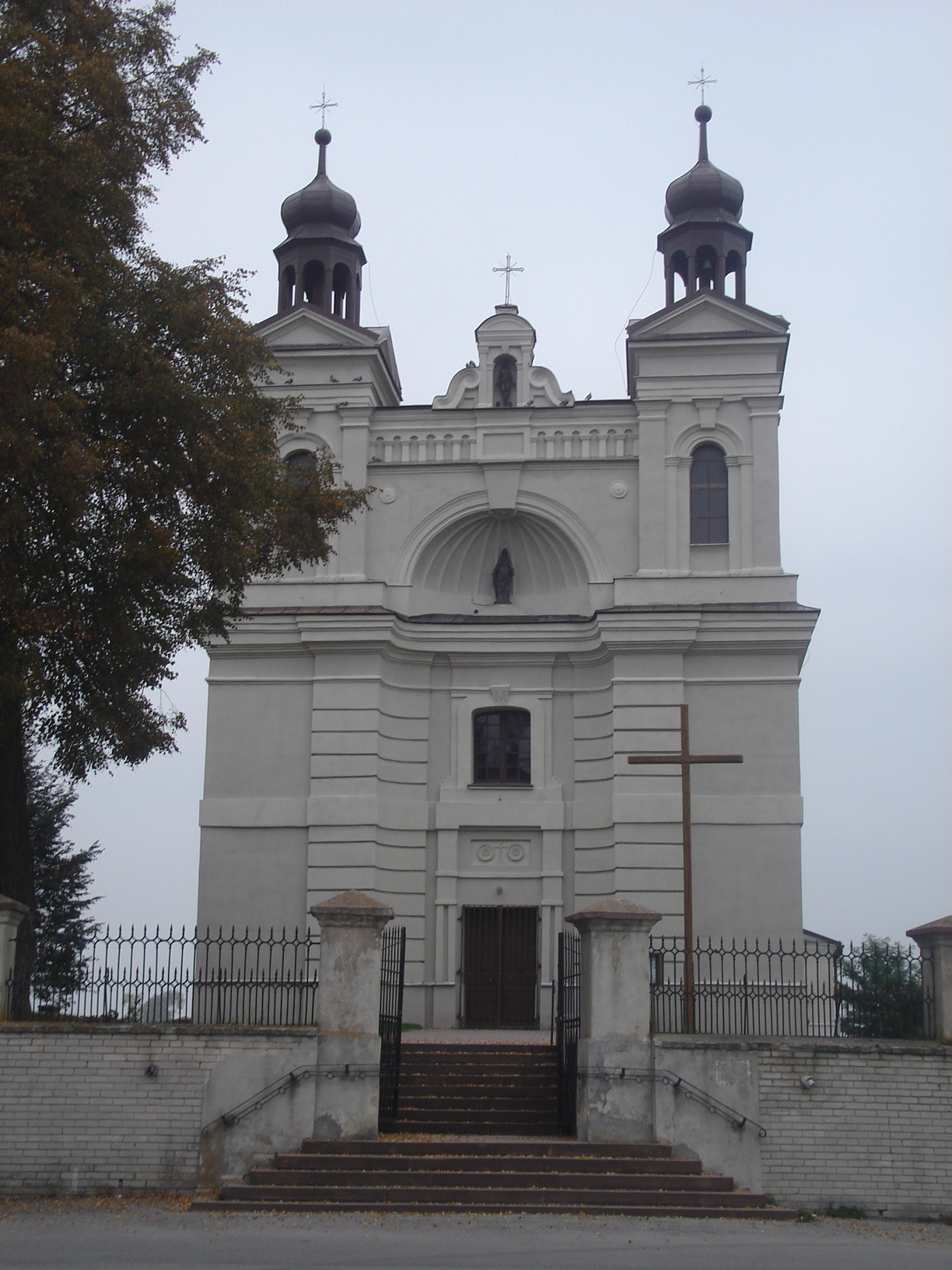 Kosciół pw. Nawiedzenia NMP w Koniecznie